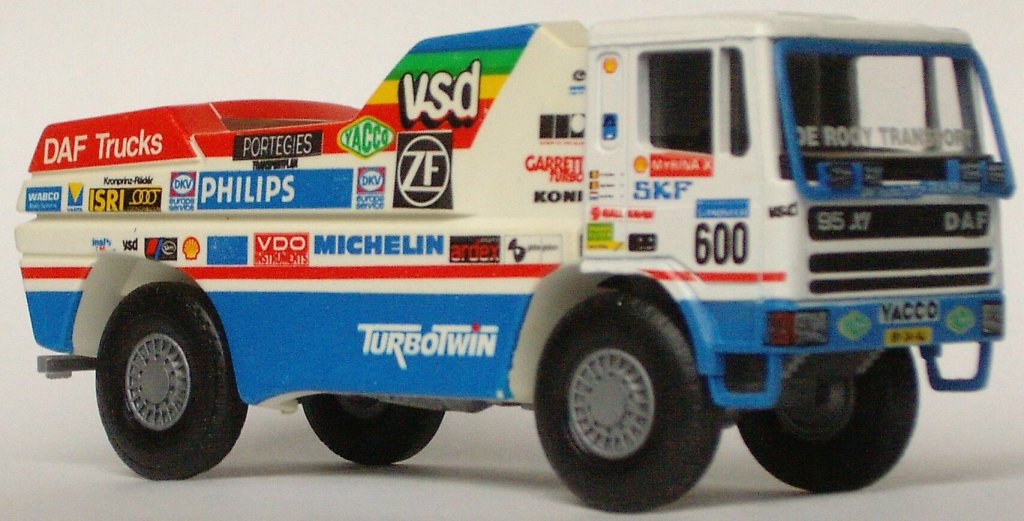 Portegies model van de DAF 95 X1 (1988) Categorie:Afbeelding modelbouw